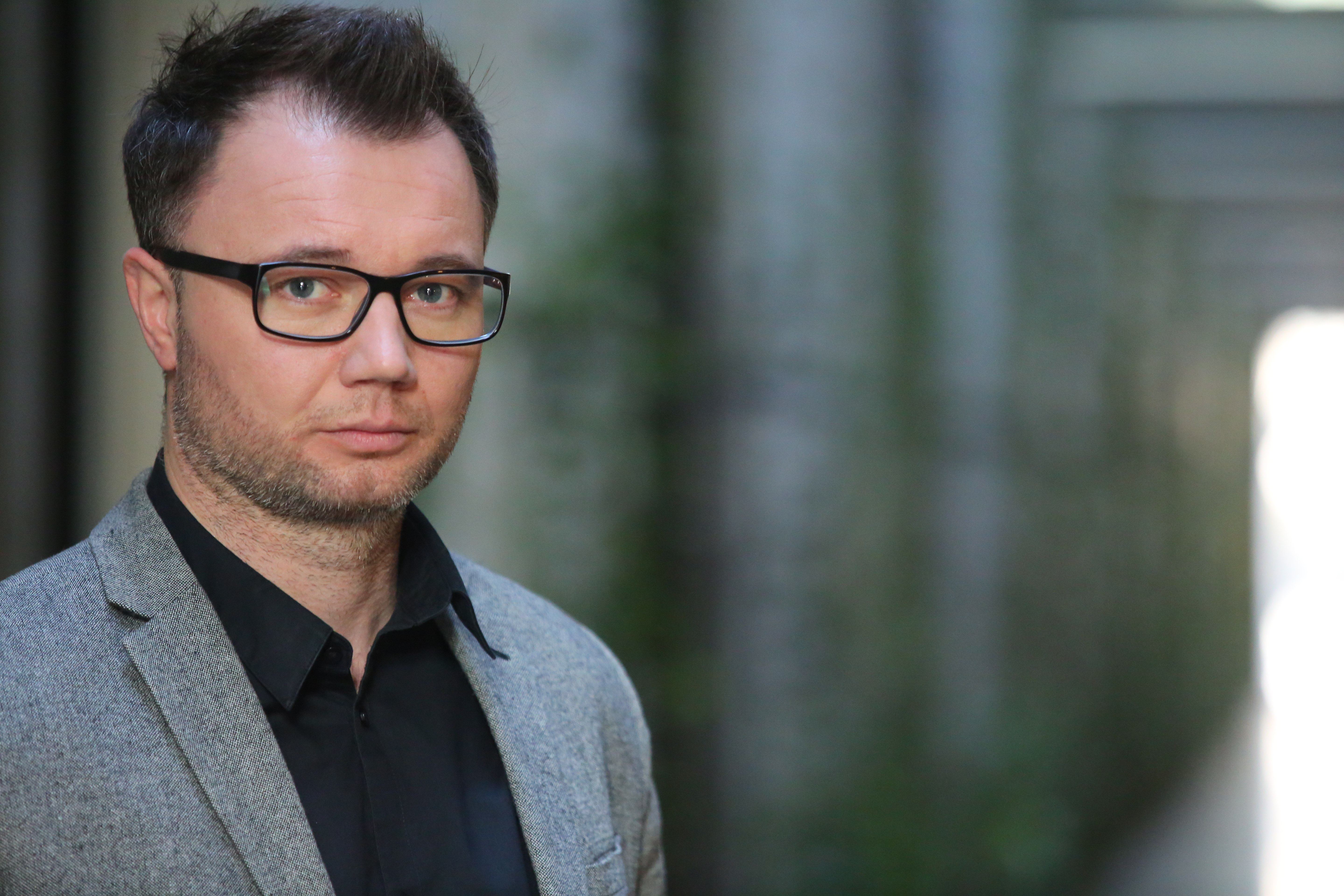 Rafał Jakub Pastwa